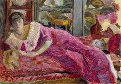 Misia en robe violette allongée sur un divan